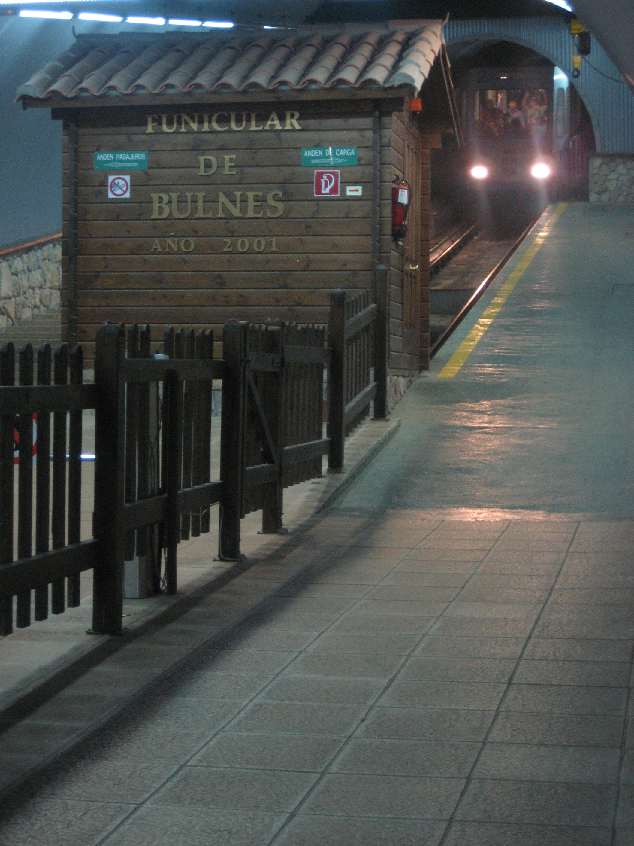 Estación y Funicular de Bulnes